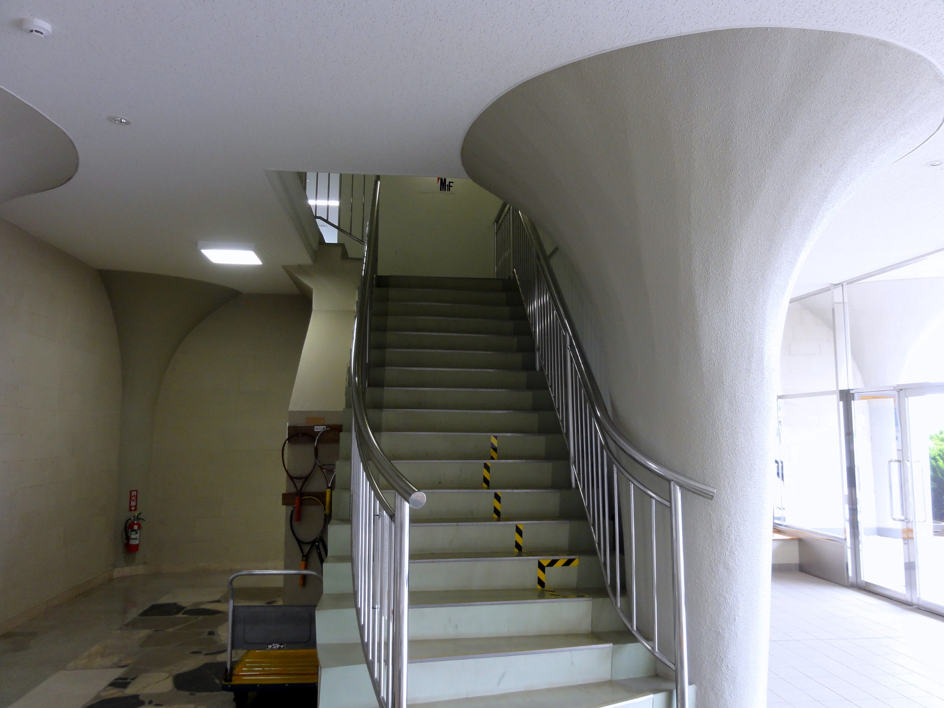 本館1階ロビー階段（2015年6月6日 長沢浄水場見学会 にて撮影）